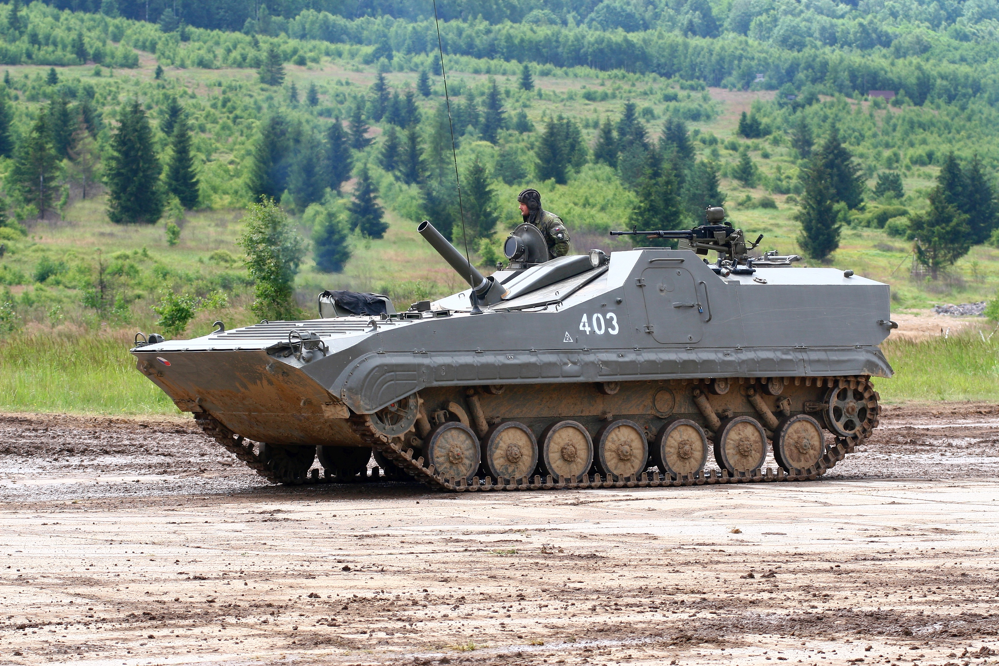 Vojenská technika zaznamenaná při dynamických ukázkách na Dni pozemního vojska BAHNA 2018, který pořádá Velitel společných sil a Nadace pozemního vojska AČR.